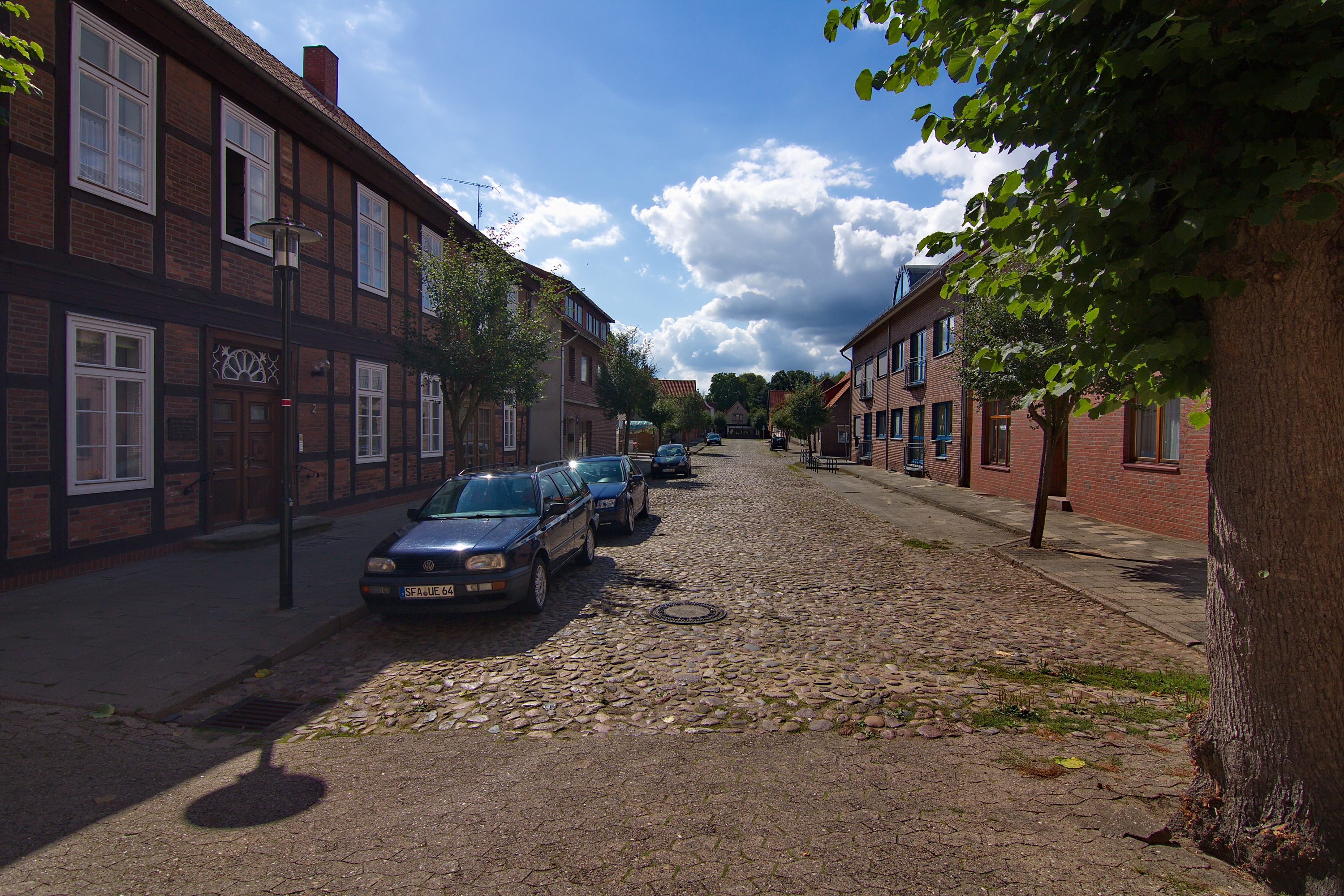 Marienkirche von 1839 in Rethem, Niedersachsen, Deutschland